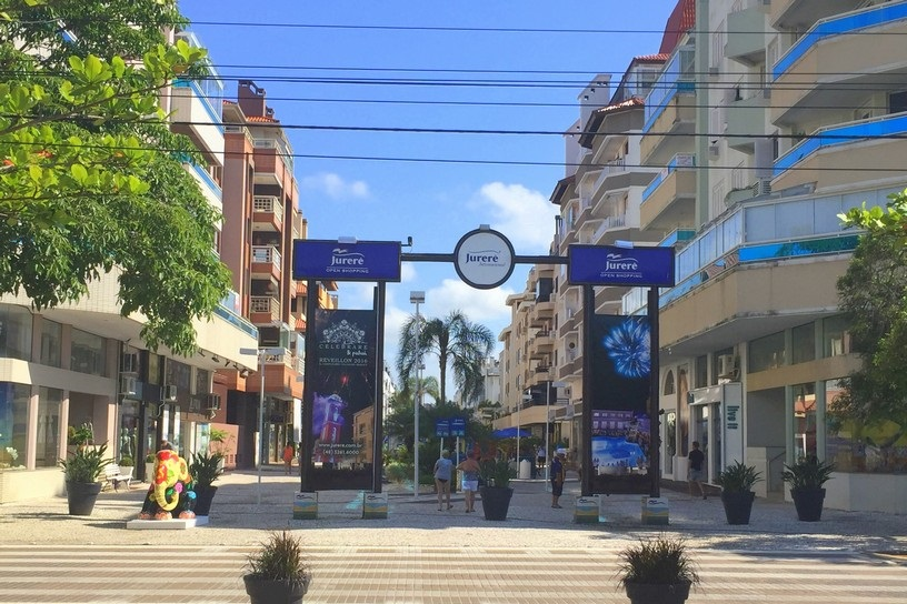 Entrada